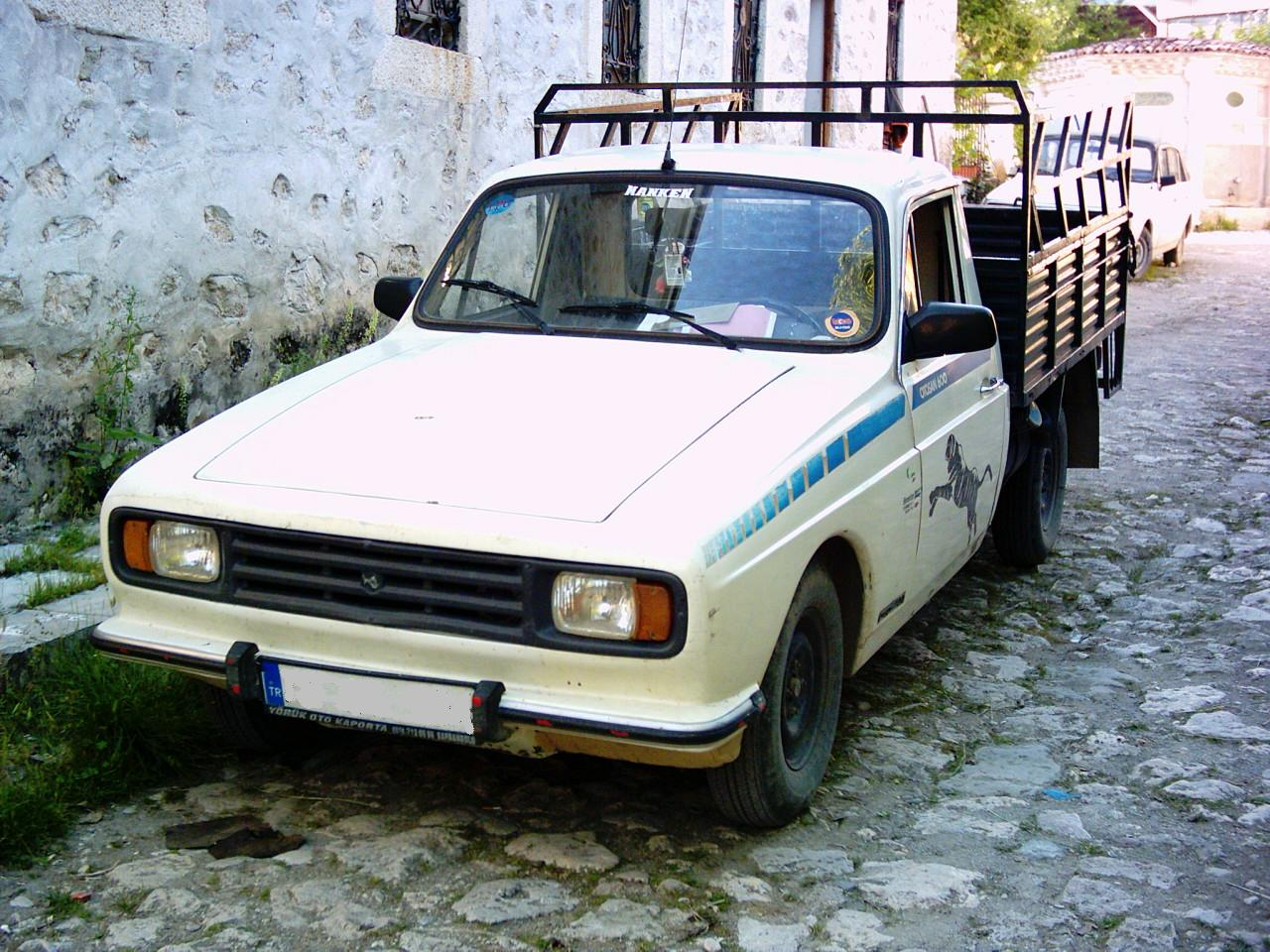 Türkiye'de seri olarak üretilen ilk otomobil markası Anadol'dan bir görünüm.